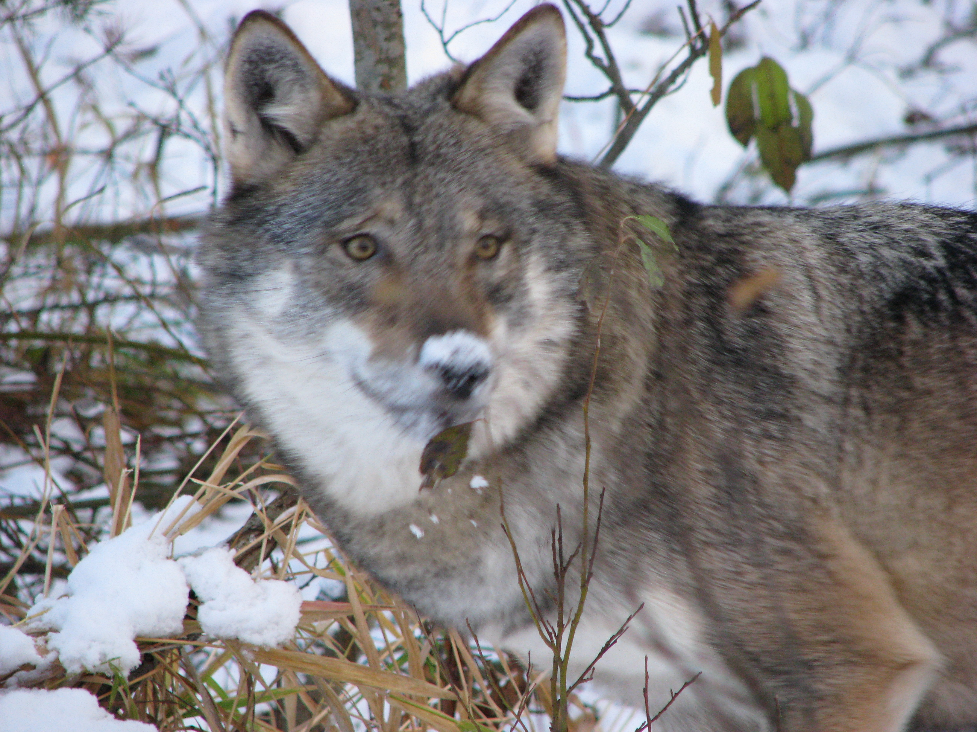 Ulven i Namsskogan familiepark